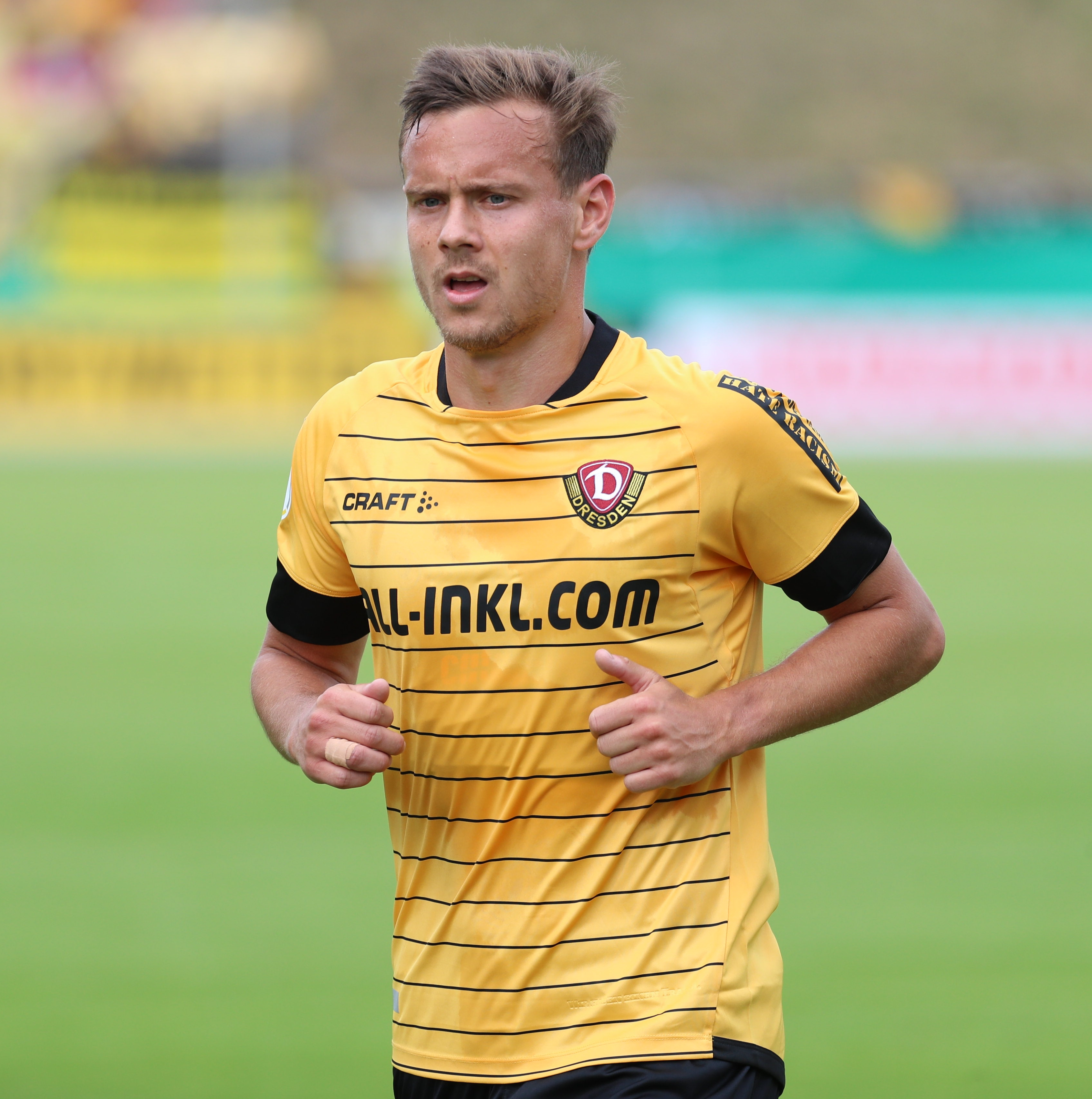 DFB-Pokal 2019/20, 1. Hauptrunde, TuS Dassendorf gegen SG Dynamo Dresden 0:3 (0:1)